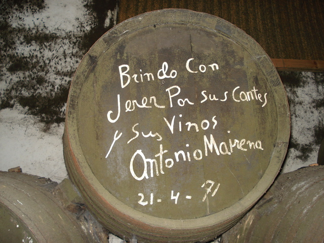 Bota de Jerez firmada por Antonio Mairena. Jerez de la Frontera (Andalucía, España)